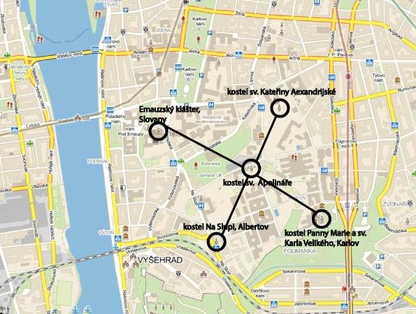 Mapa kříž kostelů